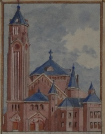 Objectgegevens Titel: Oorkonde ter gelegenheid van de eerste steenlegging van de Barbarakerk aan de Crooswijkseweg Beschrijving: Perkamenten oorkonde, vervaardigd ter gelegenheid van de eerste steenlegging van de Barbarakerk aan de Crooswijkseweg in 1922. Met loden koker (B). Tekst in zwart en rood en in het Latijn gesteld, veelkleurige sierrand, kunstig uitgewerkte hoofdletter A, afbeelding van dame met aureool, kroon, zwaard en kelk (Heilige Barbara), afbeelding van kerk en wapenschild van Rotterdam. Hier en daar verguldsel. Onderaan lijst handtekeningen. Herkomst: R.K. Barbarakerk, Crooswijkseweg, Rotterdam. Trefwoorden: oorkonde, document, informatievorm Opschrift / merk: Gesigneerd "J.K. Schmitz", onderaan onder de sierrand. Vervaardiger: J.K. Schmitz Datering: 1922 Technieken: geschilderd, gekalligrafeerd Materiaal: perkament Afmetingen: (cm) hg 51,1 / br 29,8 Associatie: heraldiek, herdenking, bouwwerk, kerk, Barbarakerk, Rotterdam, Kralingen-Crooswijk, Oud Crooswijk, Crooswijkseweg, katholicisme, ceremonie, eerste steenlegging, heilige, Barbara Vorm & decoratie: vrouw, zwaard, wapen, stadswapen Inventarisnr: Museum Rotterdam 16244-A